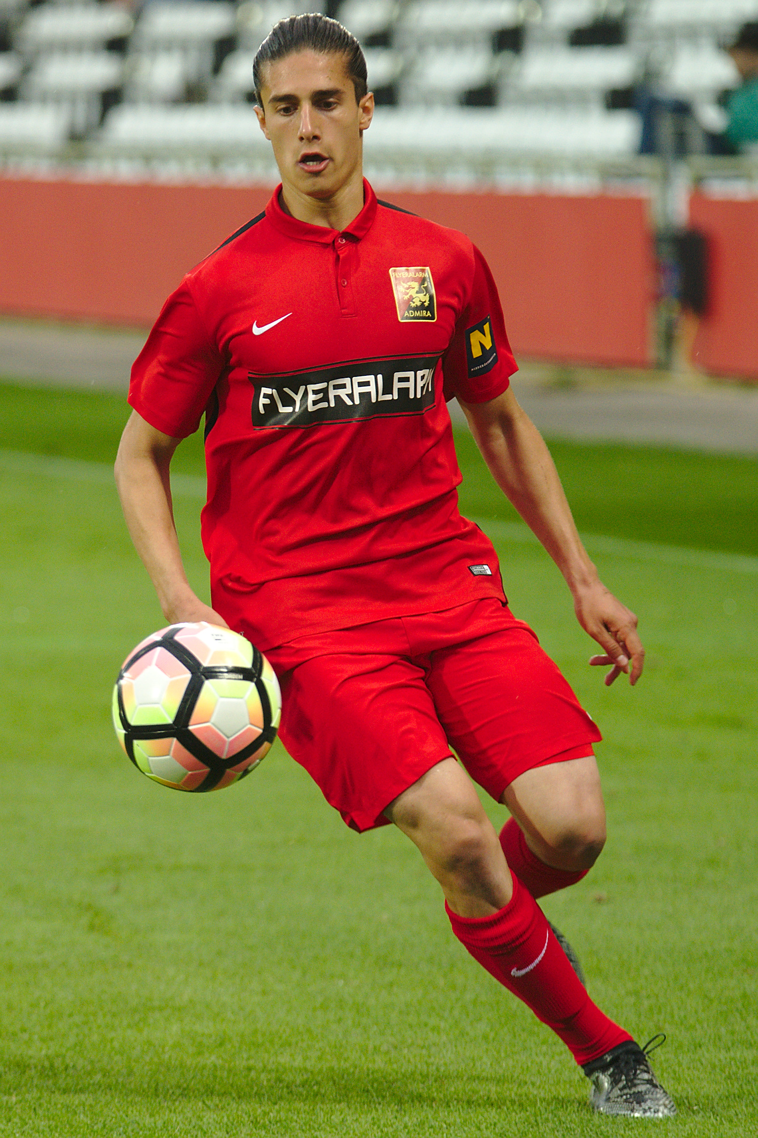 Saisonvorbereitungsspiel Admira Wacker Mödling gegen Kapfenberger SV am 17.6.2017, Bild zeigt: Miloš Spasić